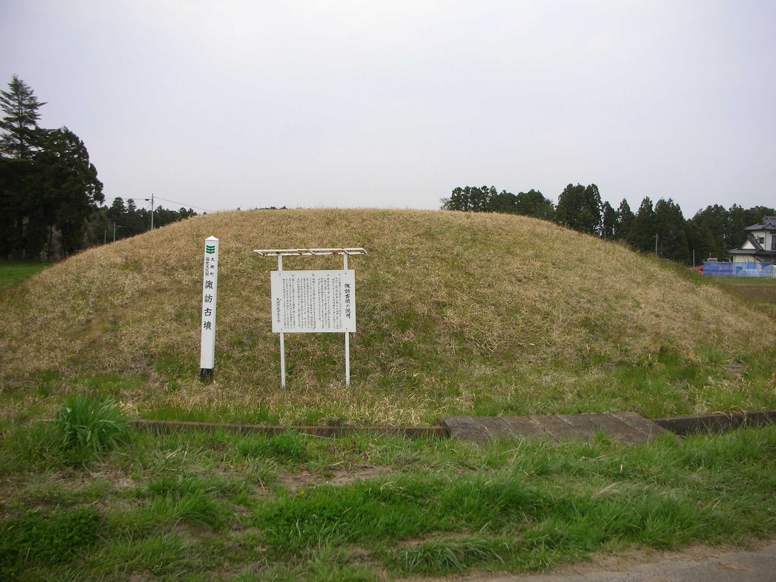 大郷町諏訪古墳